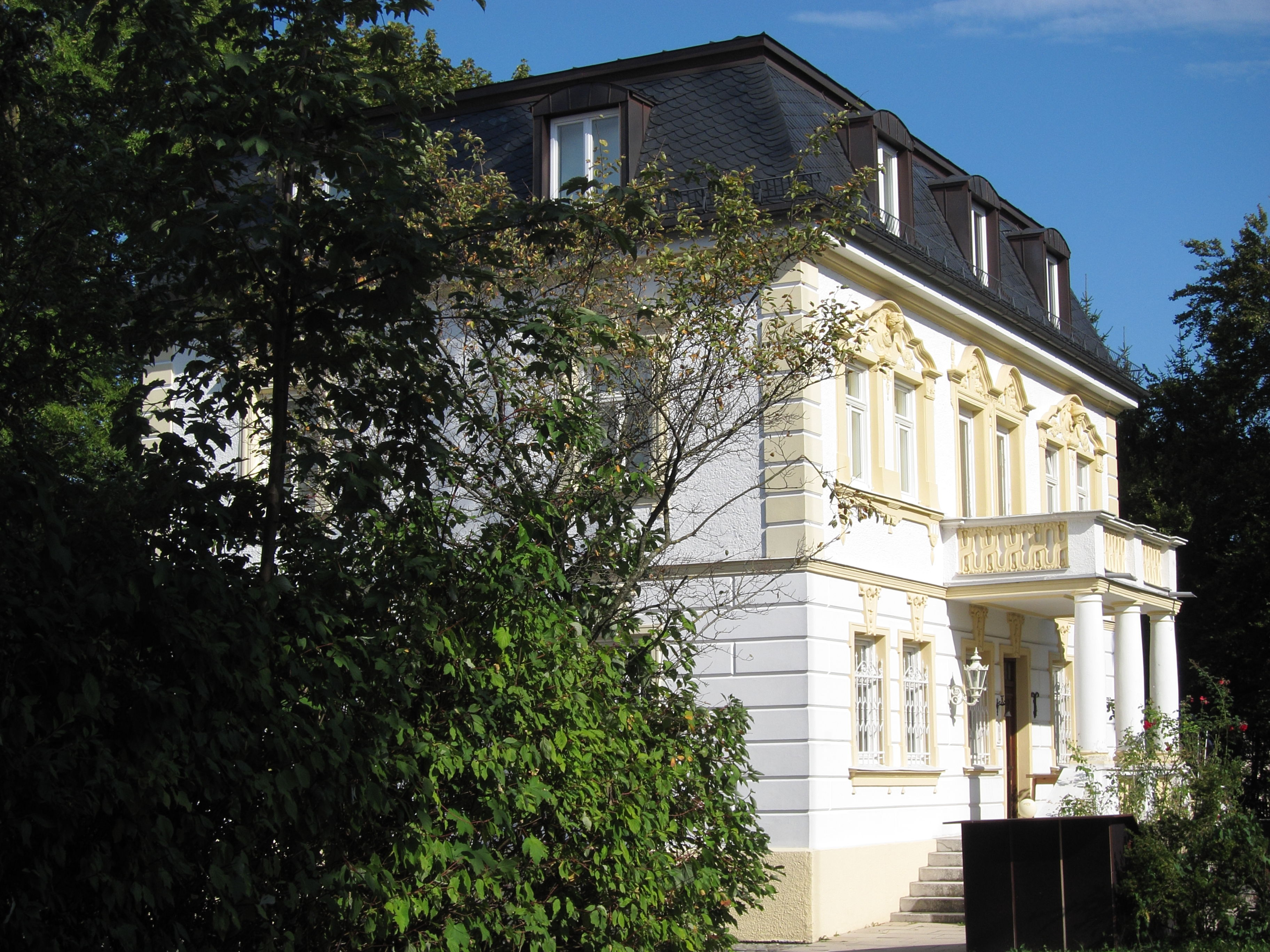 Münchener Straße 39, Vorstadtvilla, zweigeschossiger Putzbau mit Mansardwalmdach